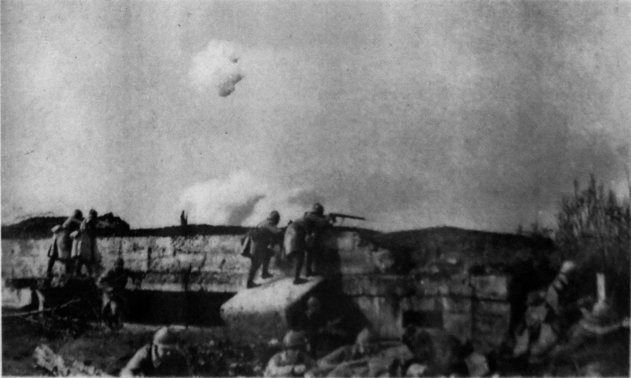 Bois des Caures combats des chasseurs . Avec l'aide des Amis du musée EMile Driant .